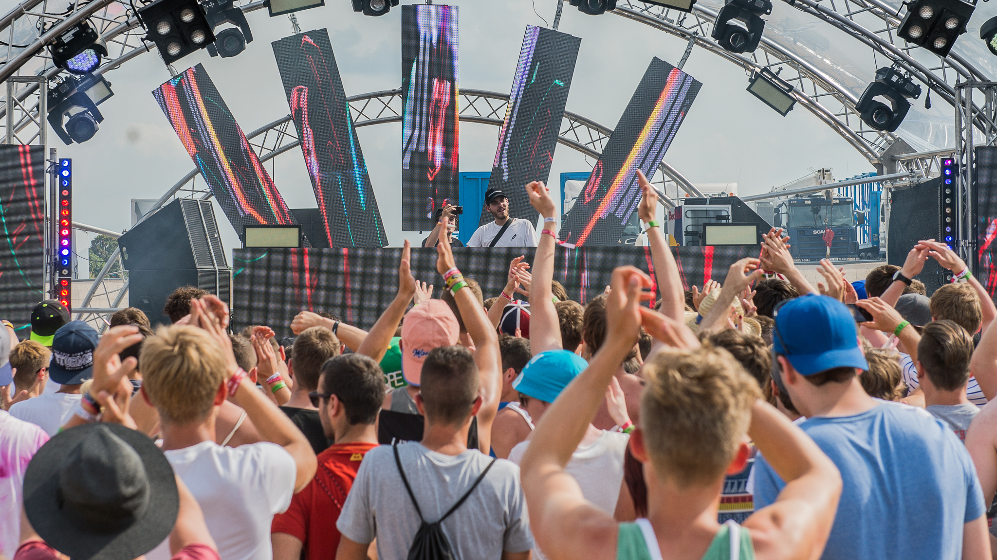 3rd Stage,Festival,Konzert,Livekonzert,Livemusik,Musik,Open Beatz 2016,San Holo,Sander van Dijck